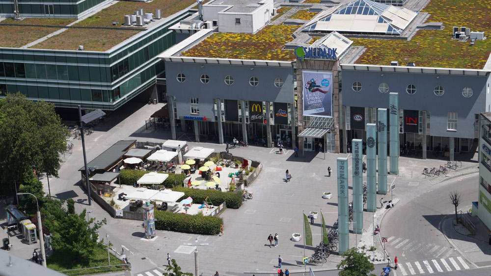 SILLPARK Shopping Center mit Strandbar im Außenbereich.